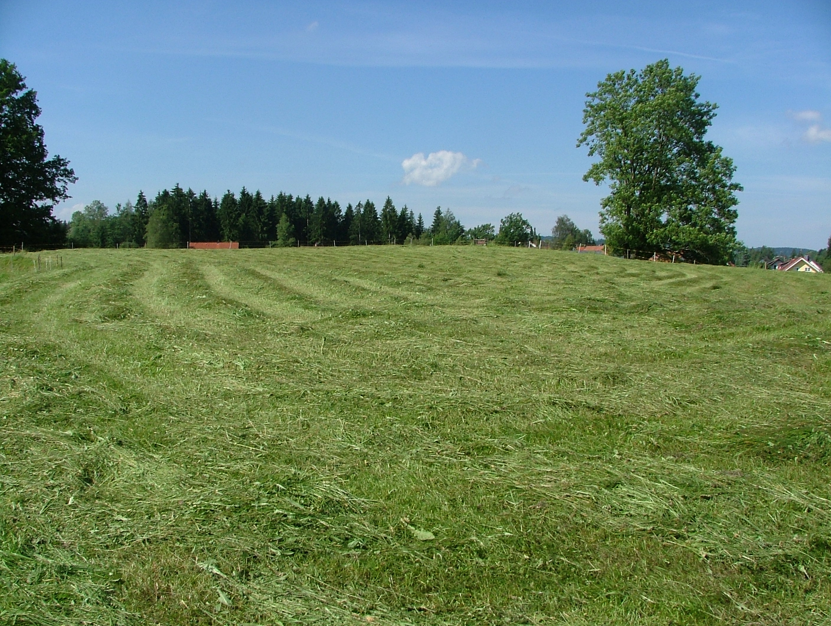 Der künstlich eingeebnete Platz des Kastells